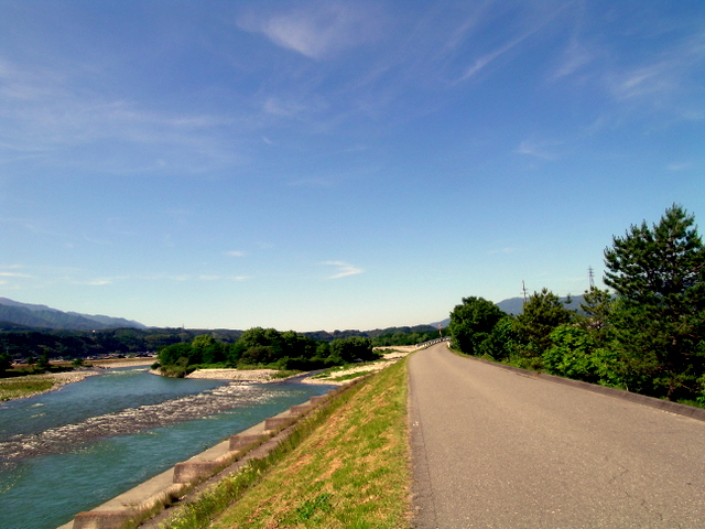 Tenryu river (天竜川) as seen in 2007.